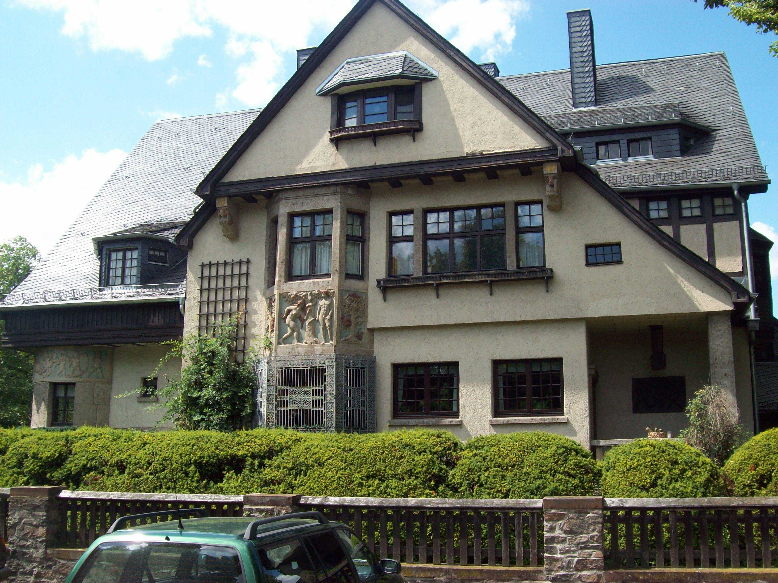 Wohnhaus Anton Kilian Gentils Aschaffenburg Lindenallee 26 erbaut 1909/10.